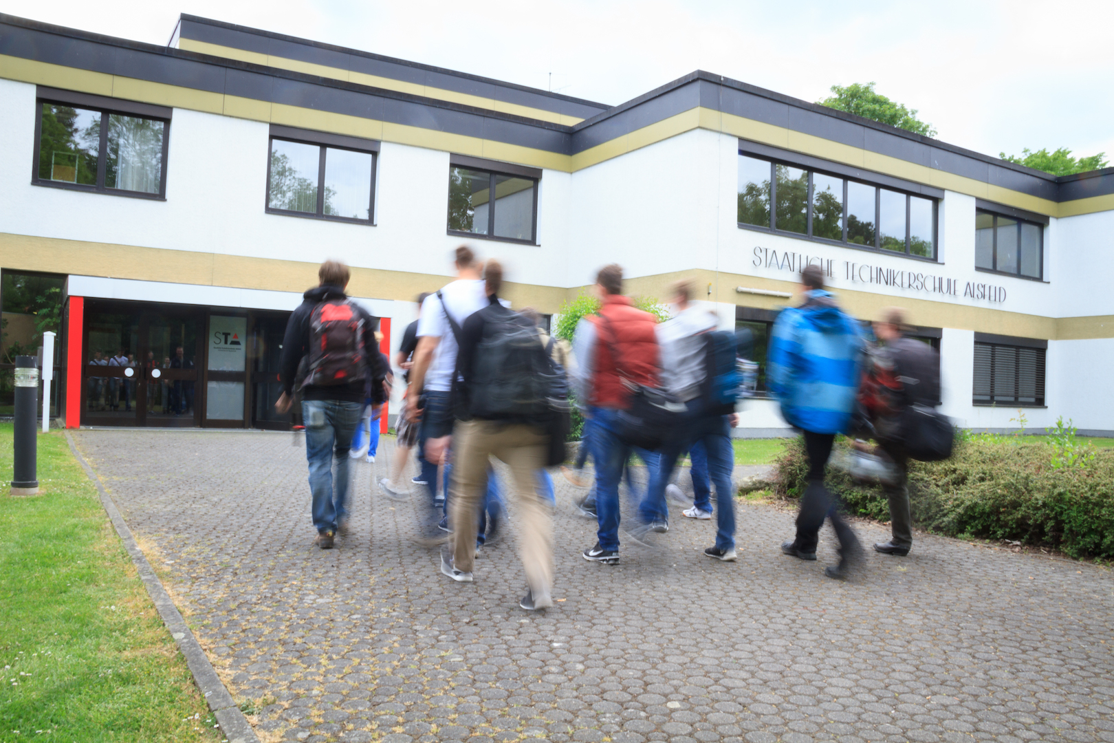 Eingang zur Staatlichen Technikakademie Alsfeld